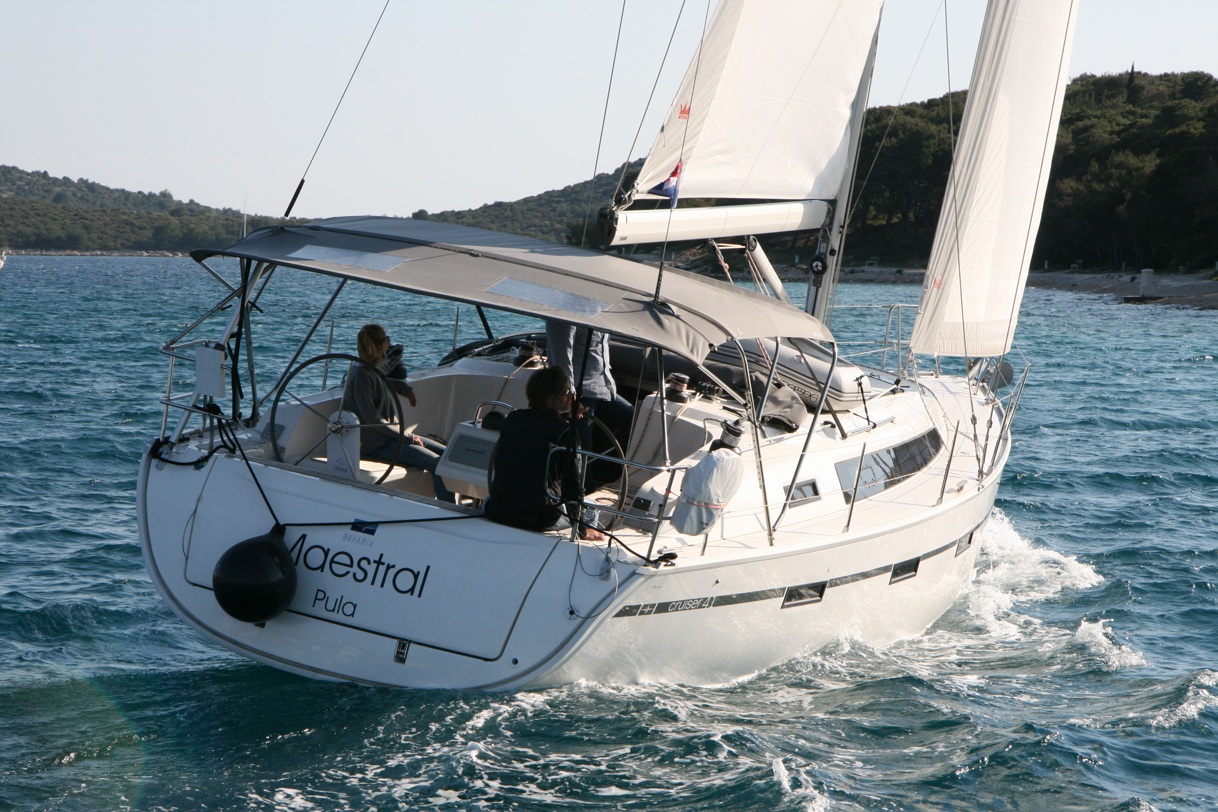 Die Bavaria cruiser 41 vor Rogoznica